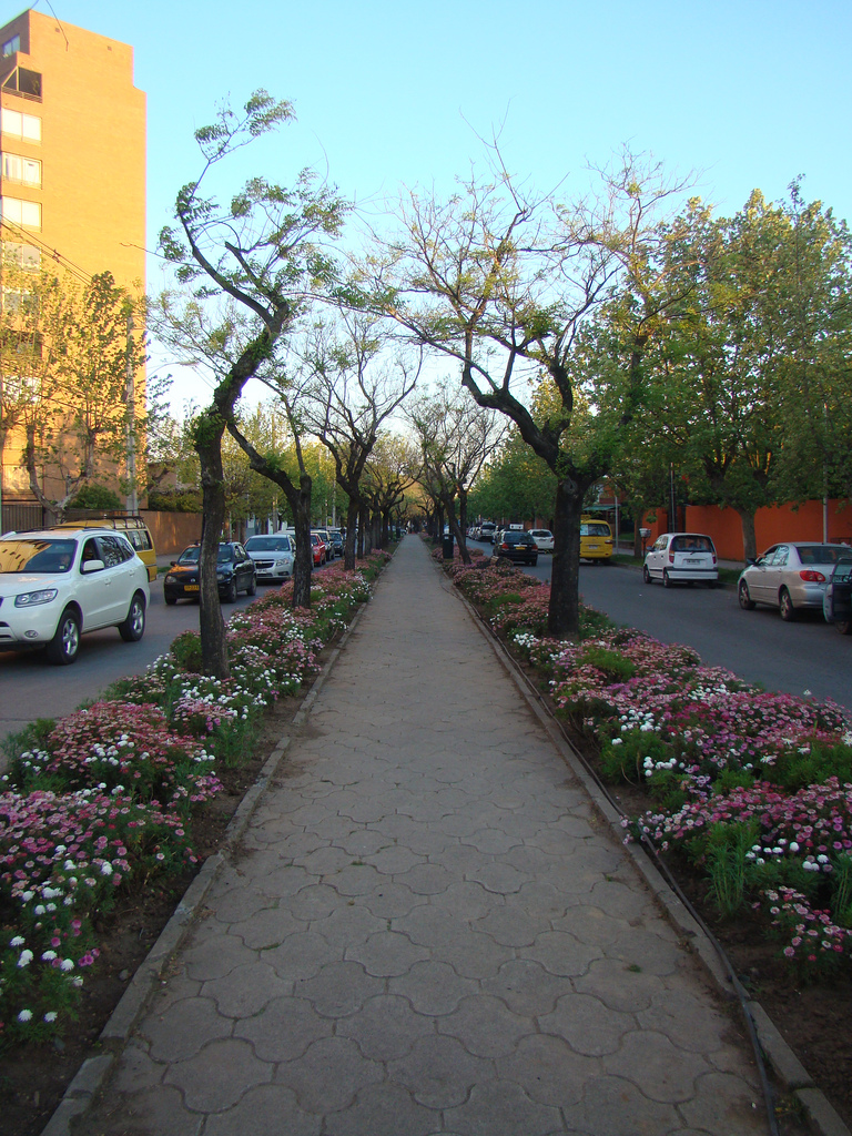 Avenida Isidoro del Solar a la altura de la Alameda.